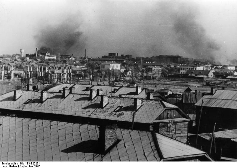 Russland, Kampf um Stalingrad Stalingrad. die rauchende brennende Stadt an der Wolga Das ist ein kleiner Ausschnitt von Stalingrad, der 20-Kilometer-Stadt an der Wolga, um die mit so großer Erbitterung gekämpft wird. Überall lodern die Brände empor. PK-Aufnahme: Kriegsberichter Herber 30.9.42 [Herausgabedatum] [Sowjetunion.- Schlacht um Stalingrad]